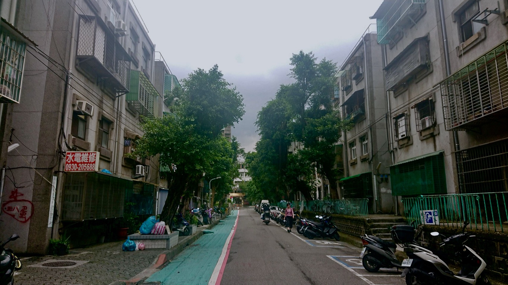 安康社區一角